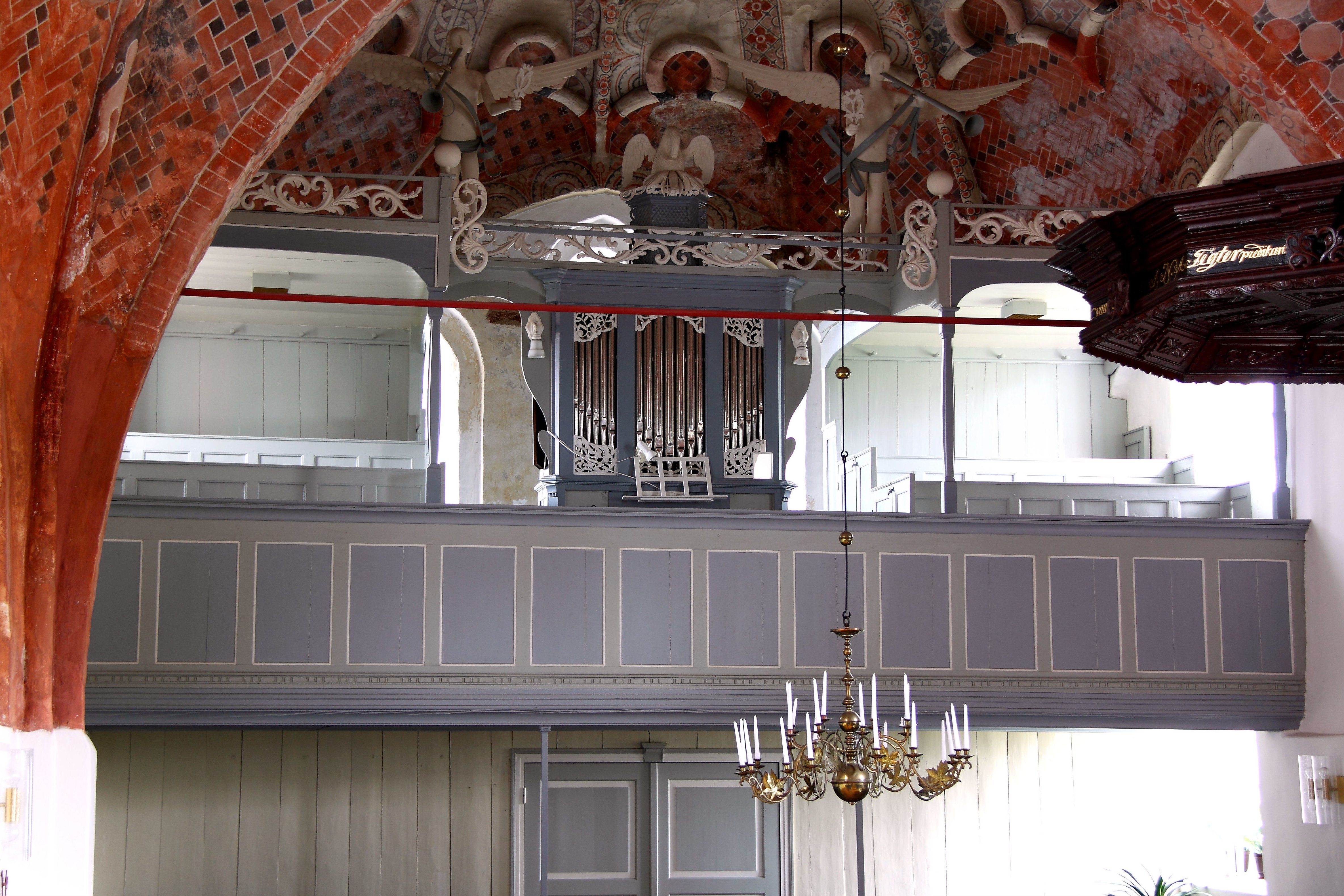 Orgel in Campen, reformierte Kirche, Landkreis Aurich